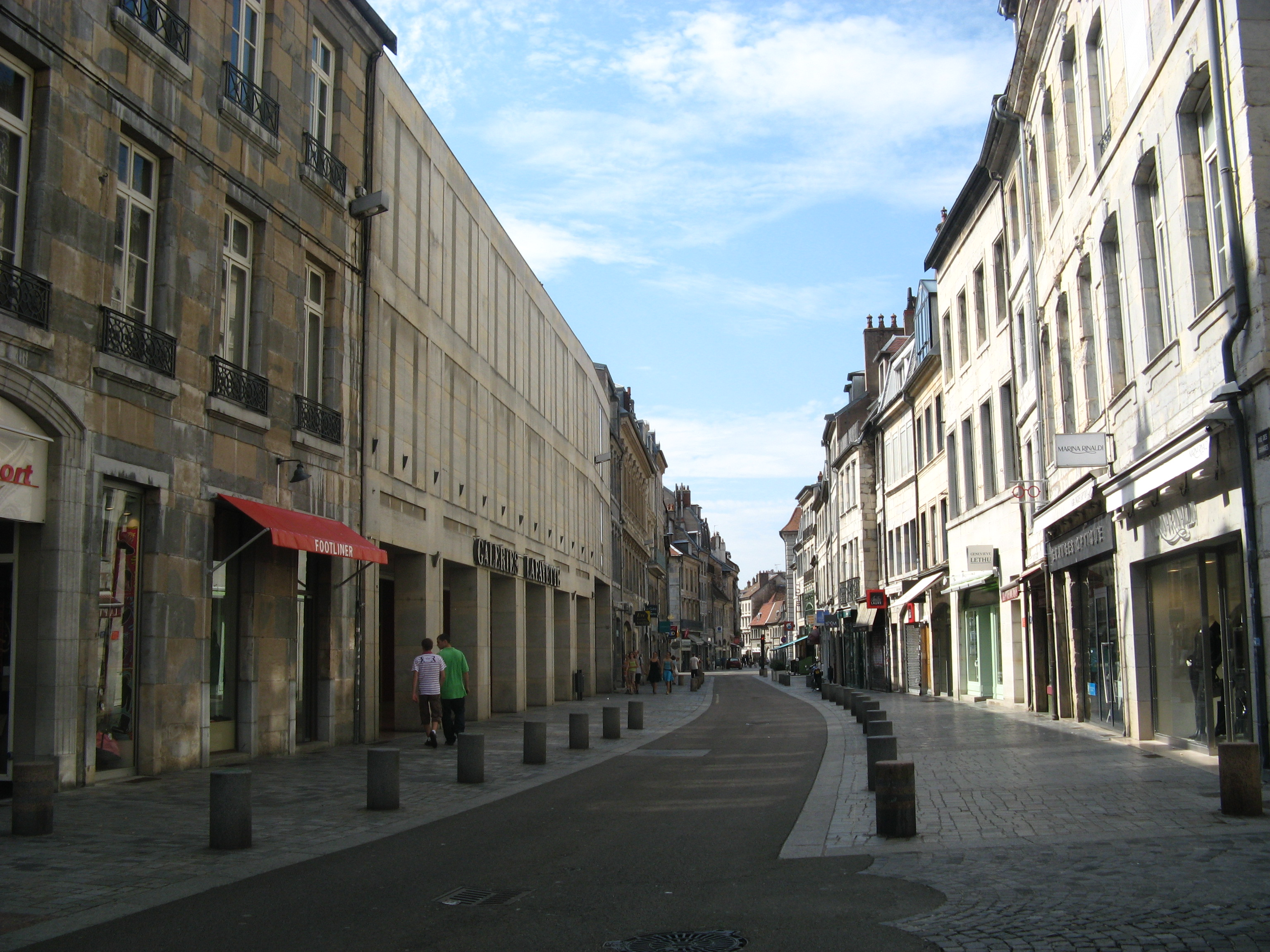 rue des granges à Besançon